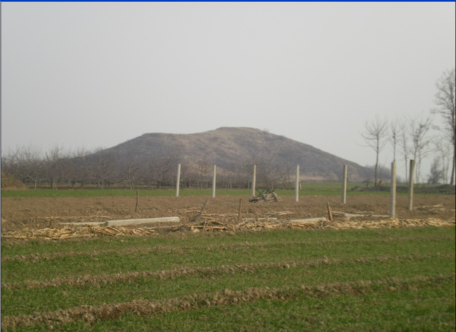 位于汉武帝茂陵东，俗称“羊角冢”